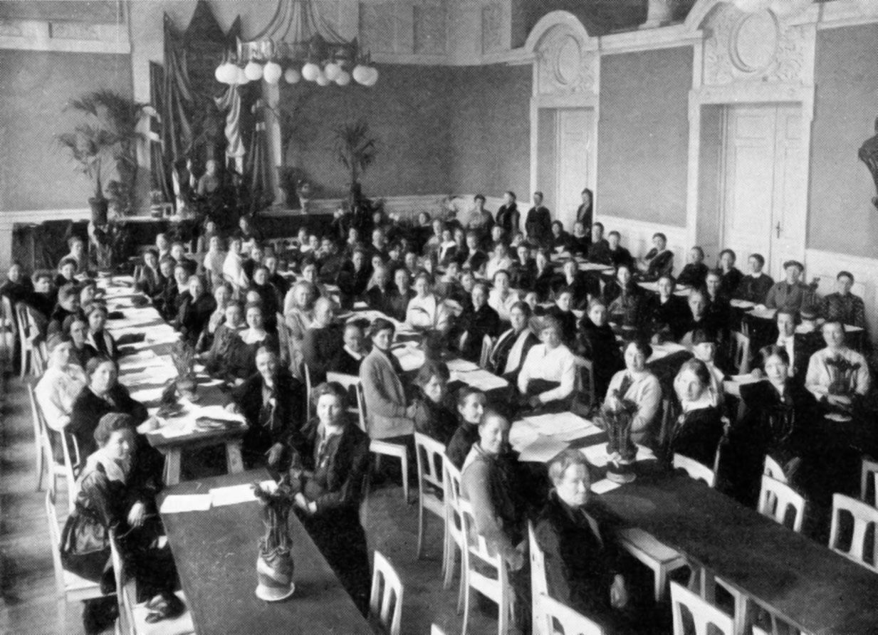 Arbeiderpartiets kvindeforbunds landsmøte i 1918